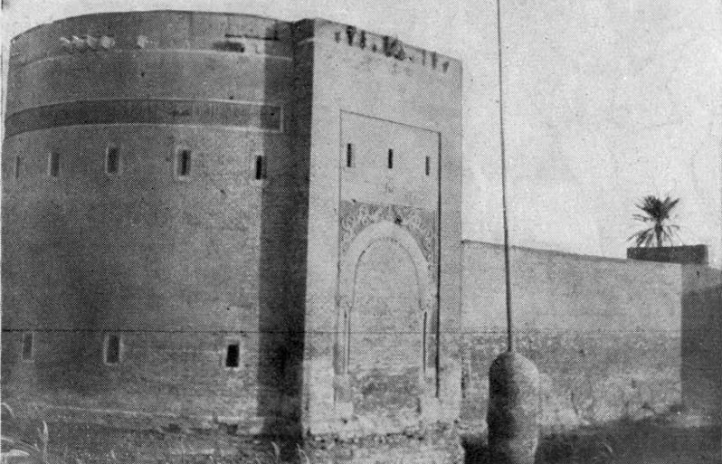 Baghdad, Iraq